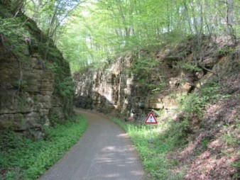 de Grand Canyon op der Velospist PC2 um Scheedgen.